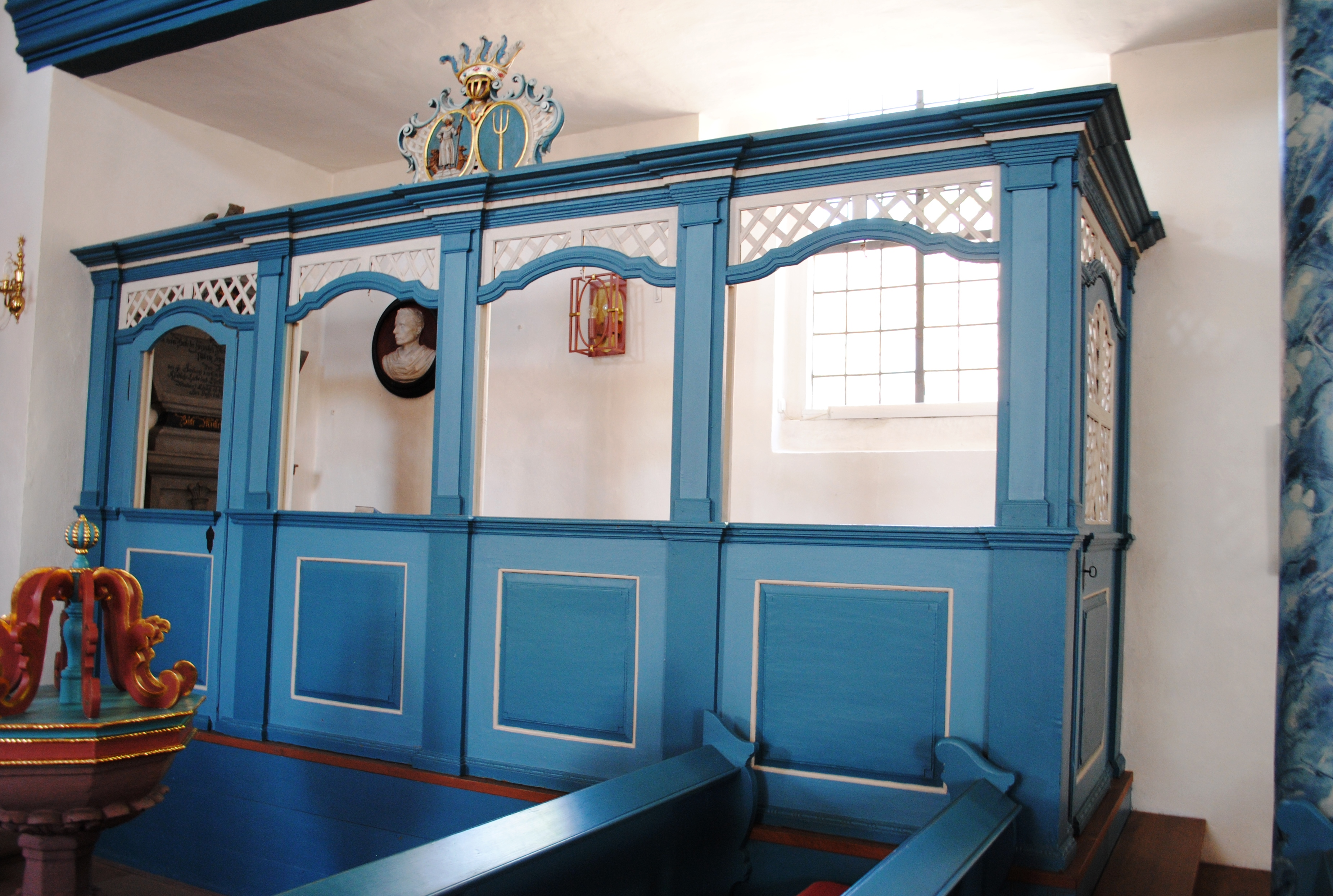 Innenausstattung Kirche St. Andreas, Schernau (Dettelbach), Herrschaftsloge von Roman